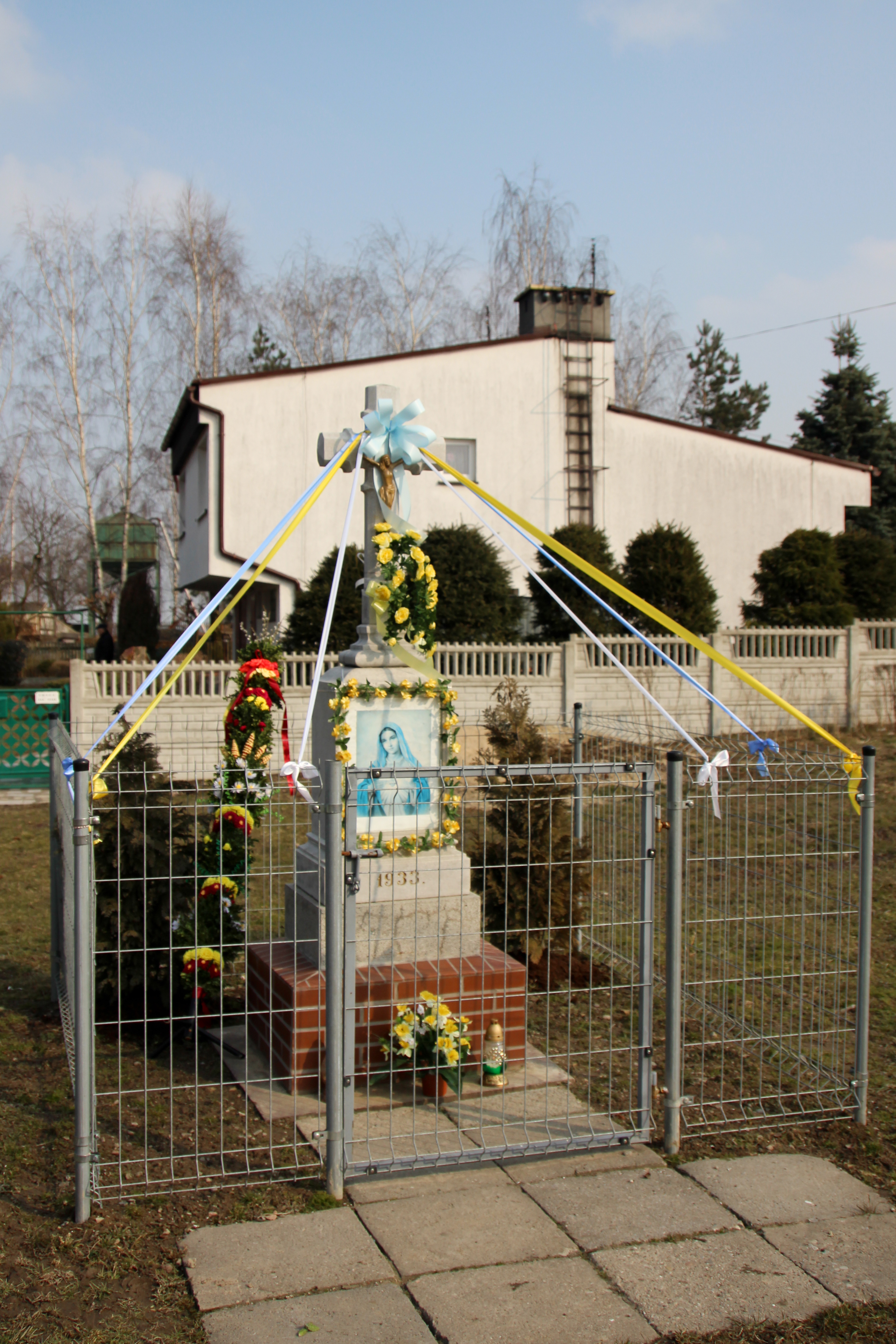 Nowa Wieś Mała – wieś w Polsce, w województwie opolskim, w powiecie brzeskim, w gminie Grodków.